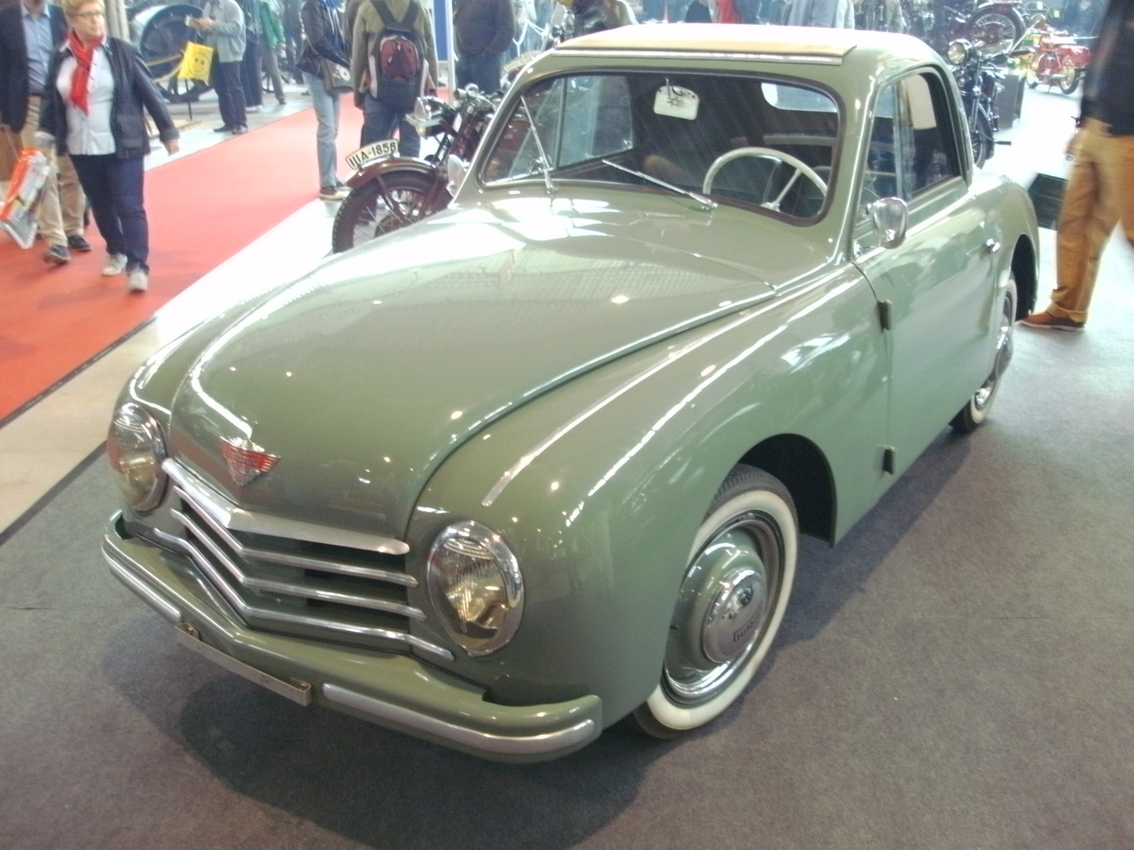 Gutbrod Superior 600 auf Retro Classics Stuttgart 2014